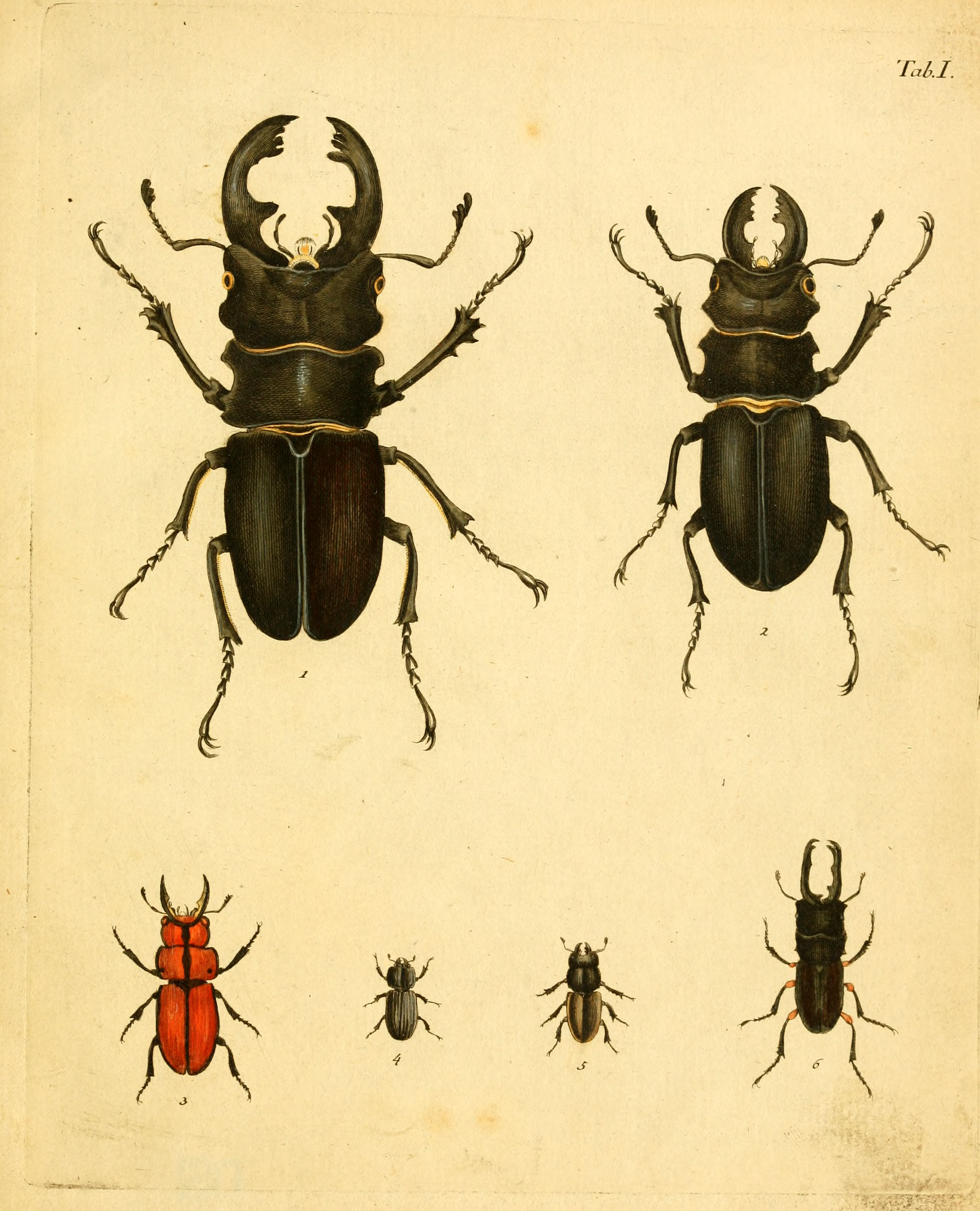 Hand-coloured plate from Abbildungen zu Karl Illiger's Uebersetzung von Olivier's Entomologie.